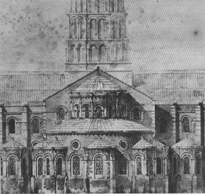 élévation de l'abside de Saint Sernin de Toulouse, réalisé par Eugène Viollet le Duc.